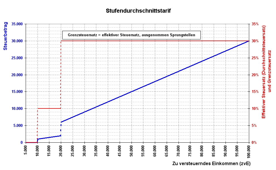 Beispiel für einen Stufendurchschnittssatztarif: Die blaue Linie zeigt den Verlauf der Steuerbetragsfunktion (linke Skala). Die rote Linie zeigt den Verlauf der Steuersätze (rechte Skala).